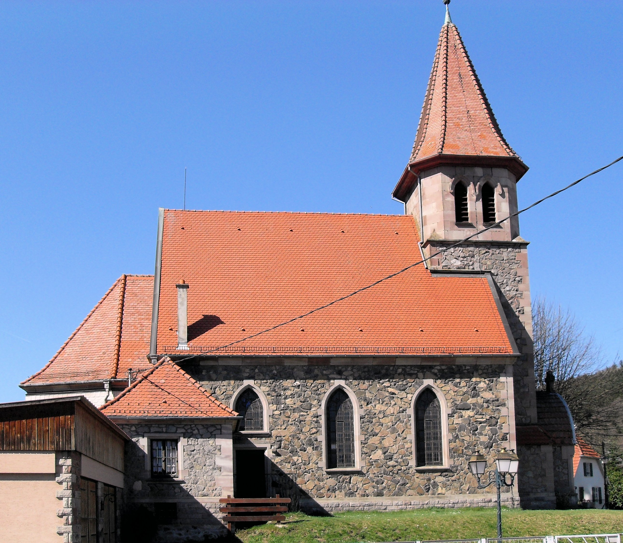 La chapelle Saint-Wendelin à Niederbruck